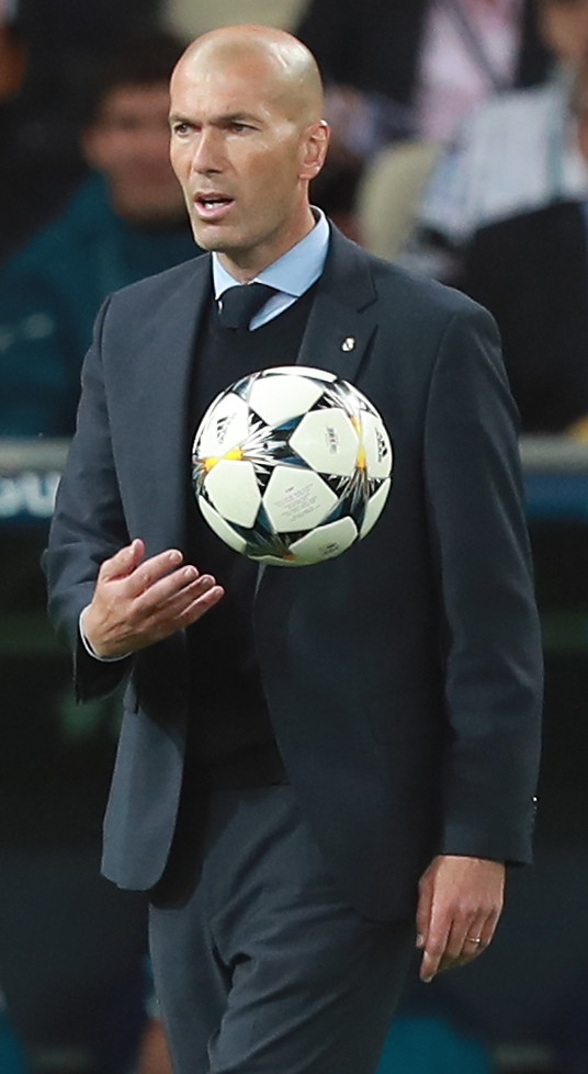 Финал ЛЧ в Киеве: 13-й кубок «Реала» и слёзы «Ливерпуля»